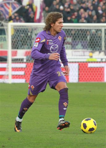 Alessio Cerci (Velletri, 23 luglio 1987) è un calciatore italiano, ala della Fiorentina.